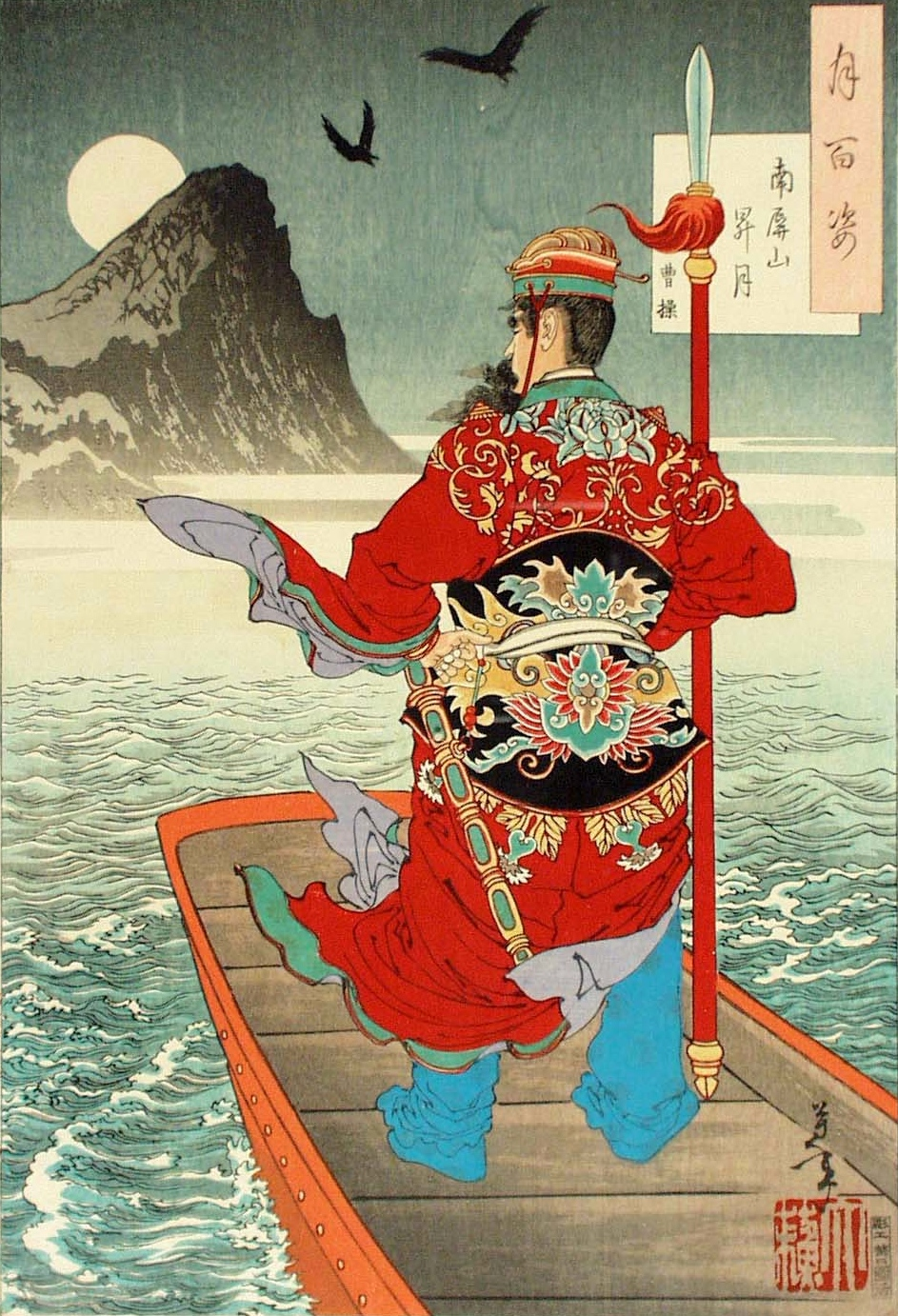 Lever de lune sur le Mont Nanping contemplé par Cao Cao